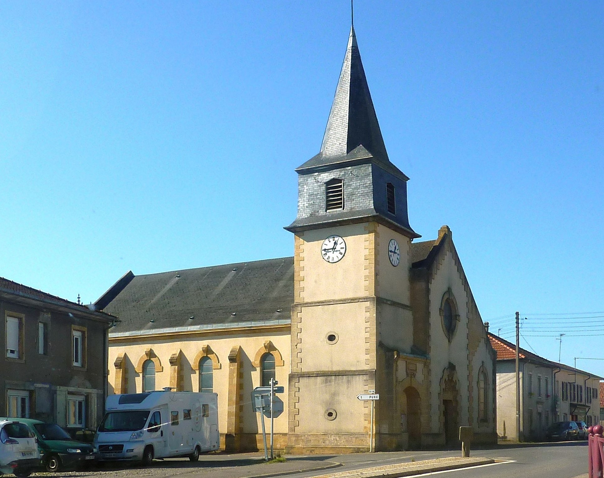 Église St-Martin de Jeandelize